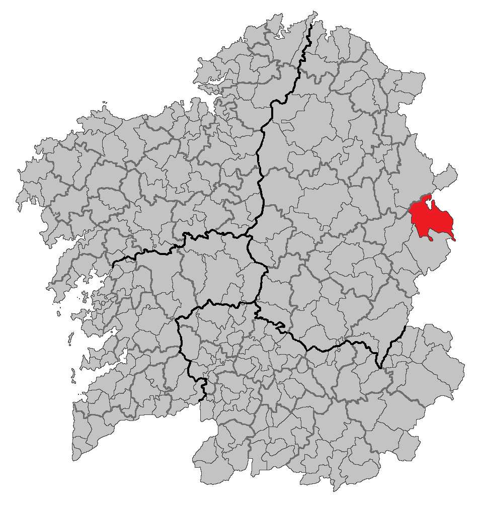 Mapa coa localización do concello de Navia de Suarna.